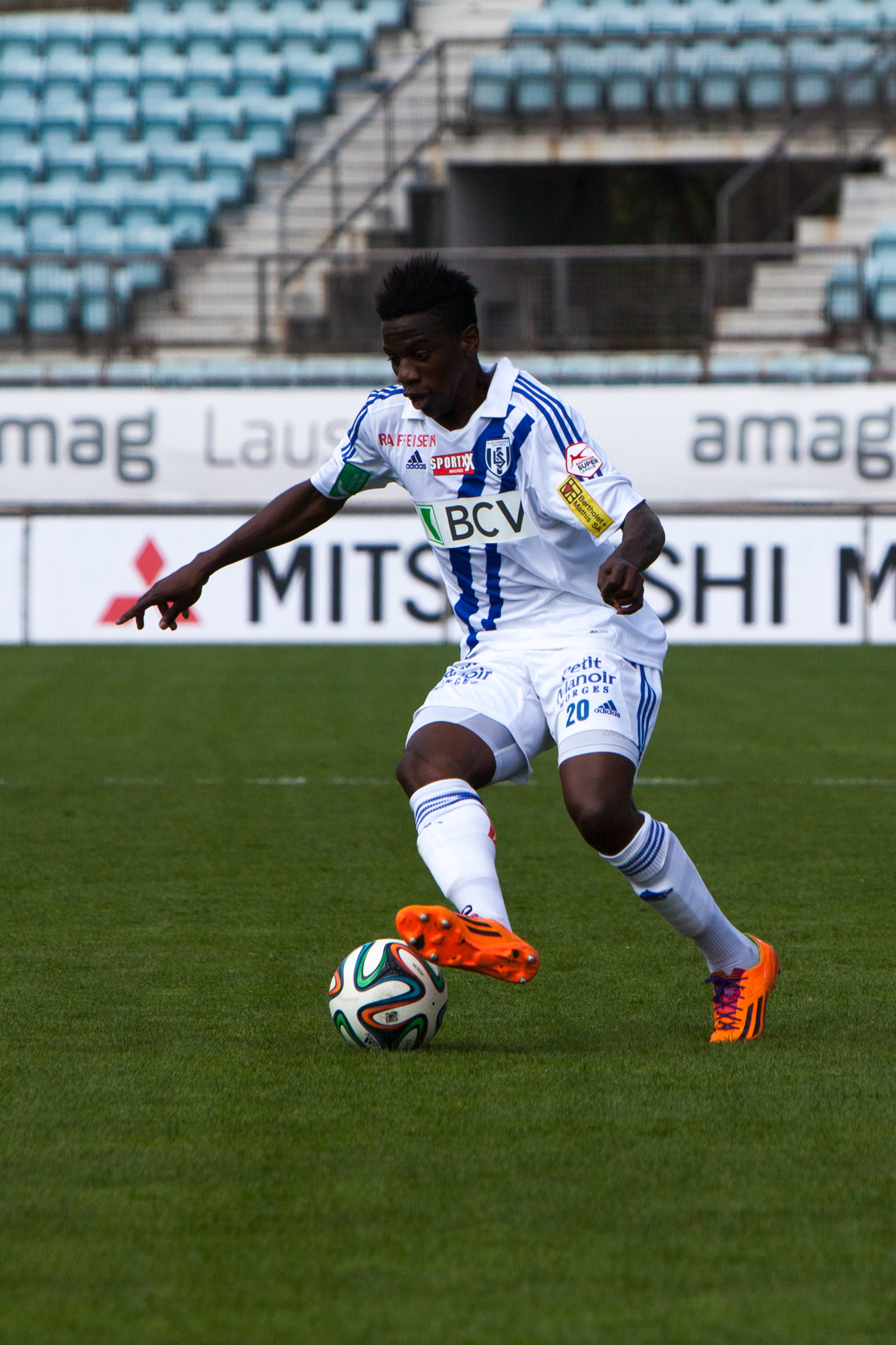 Lausanne Sport vs FC Sion - Avril 2014 - Patrick Ekeng